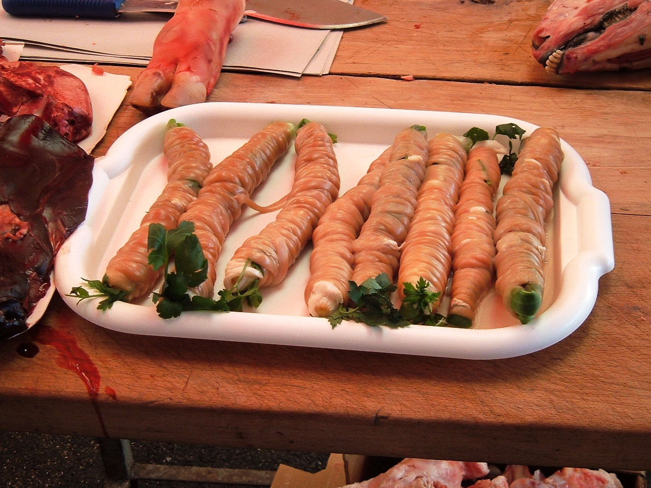 Un piatto di cipollate in vendita alla Pescheria di Catania